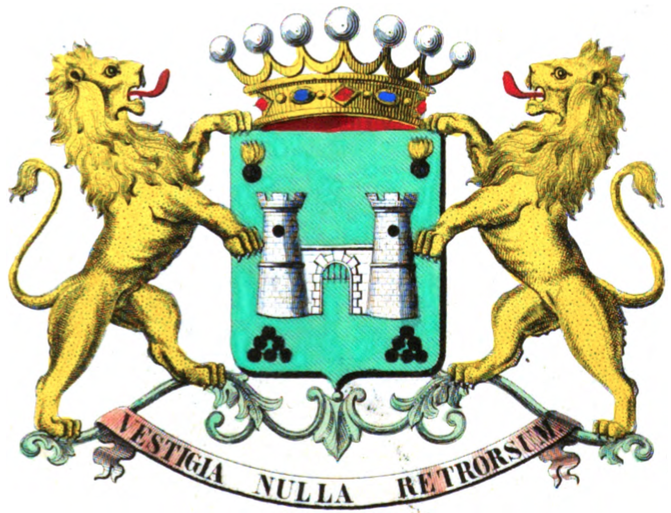 Armoiries de la famille van der Smissen de Cortenberg